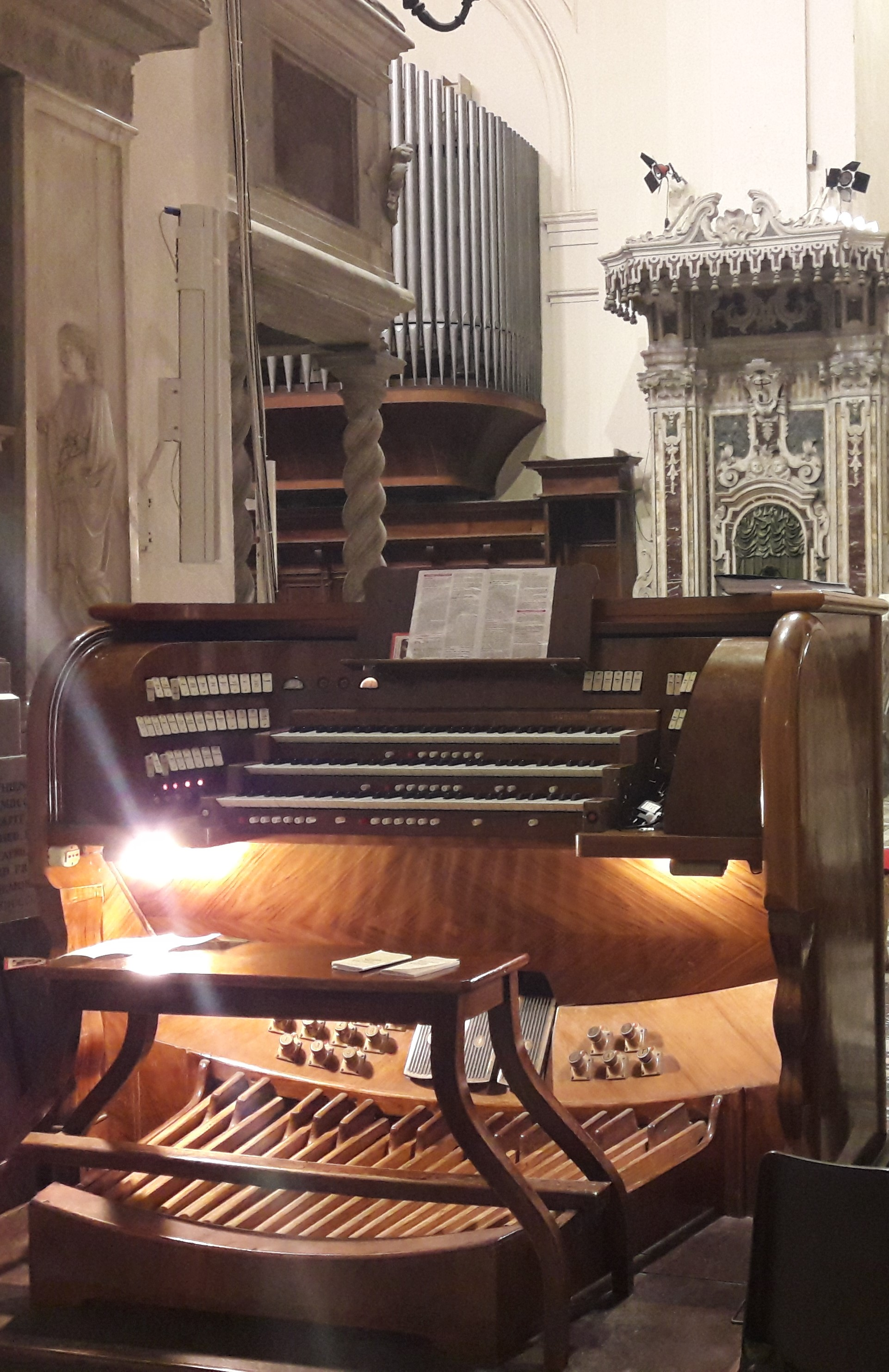 Consolle mobile indipendente